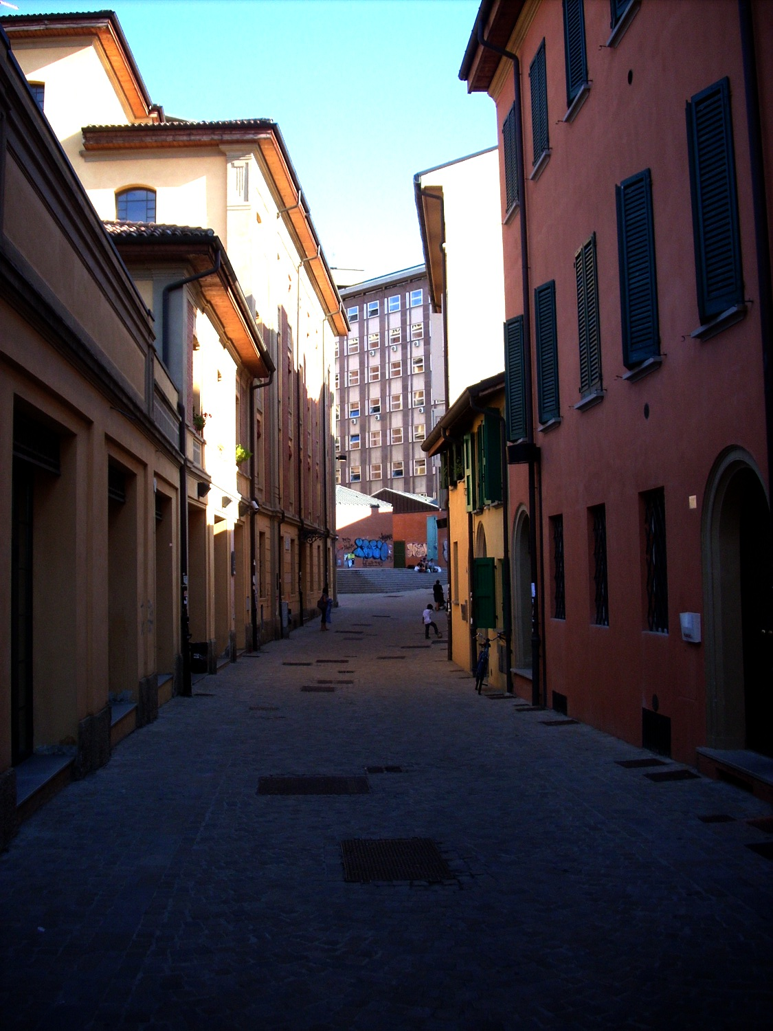 Manifattura delle Arti